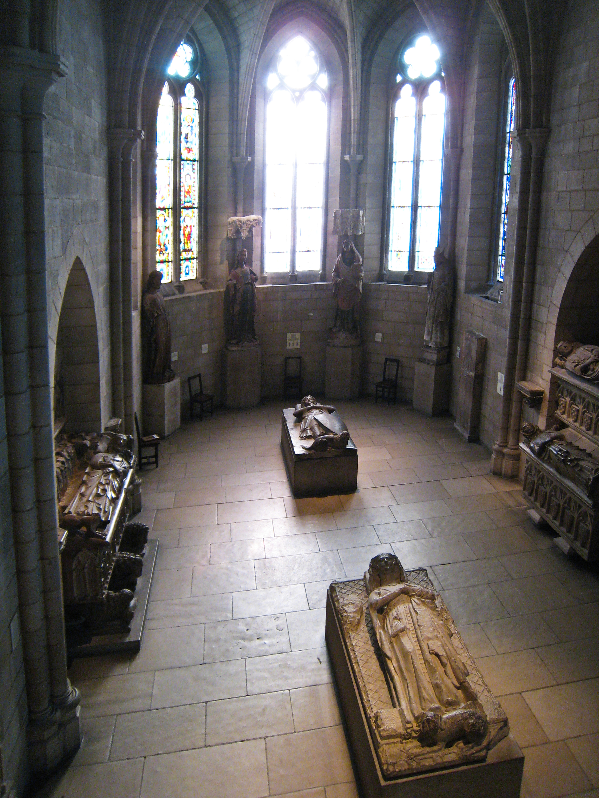 Cloisters Chapel